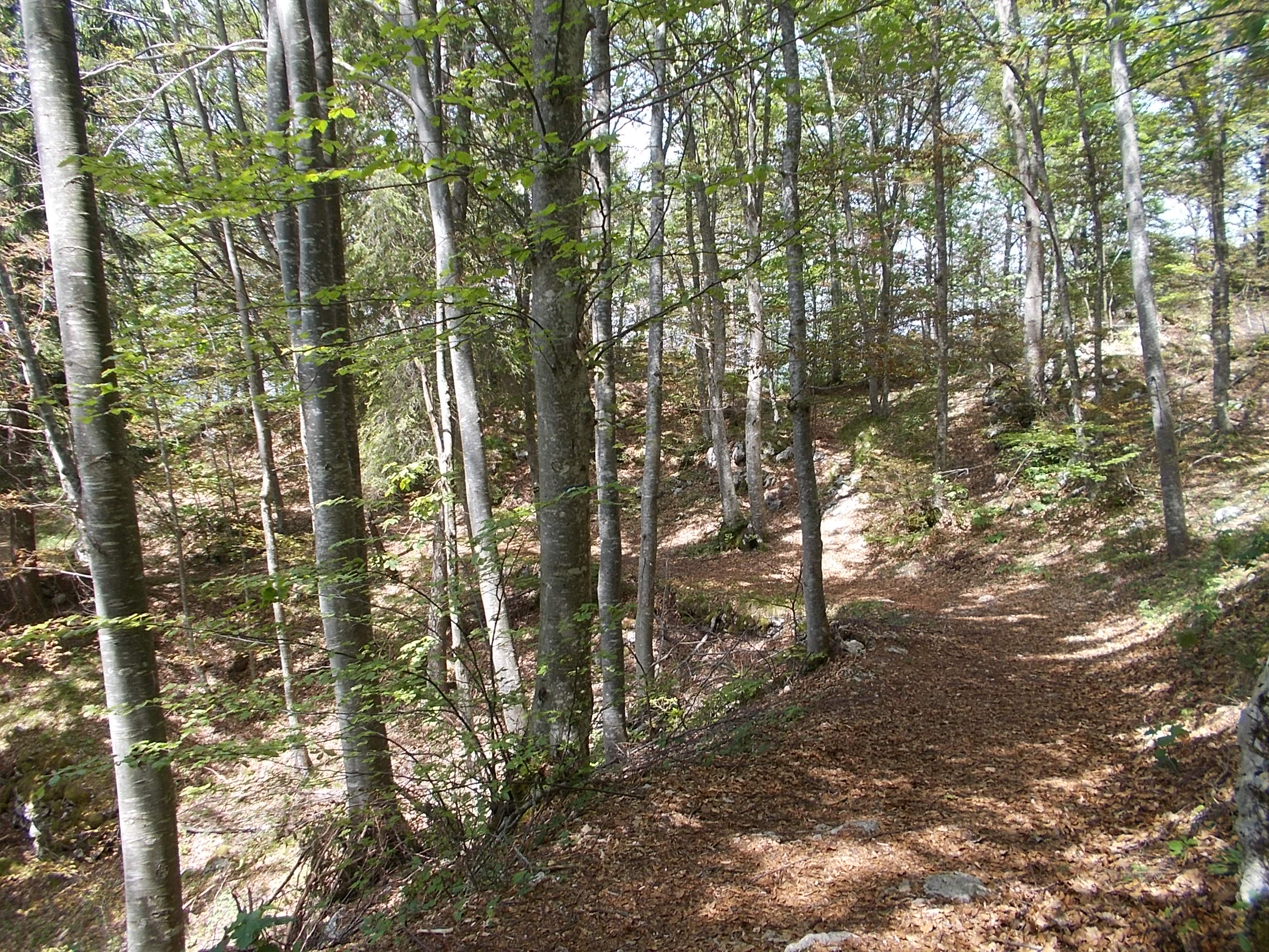 Catena di Lagorai (Q47495251)